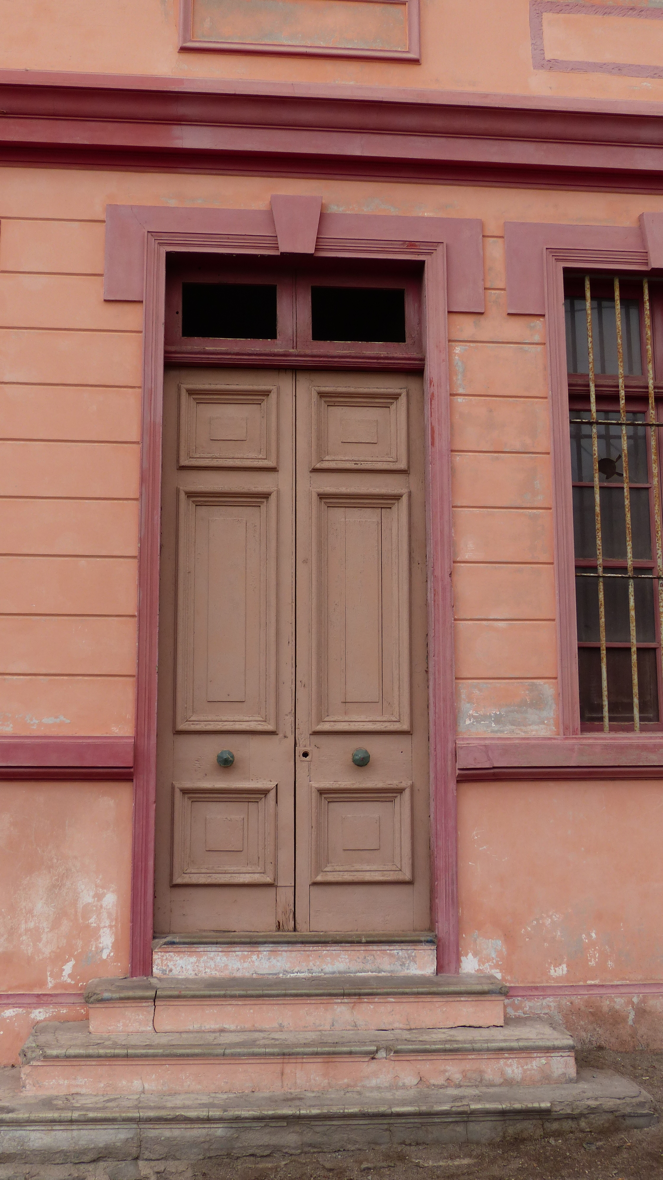 Cárcel Pública de Pisagua This is a photo of a national monument in Chile: 287